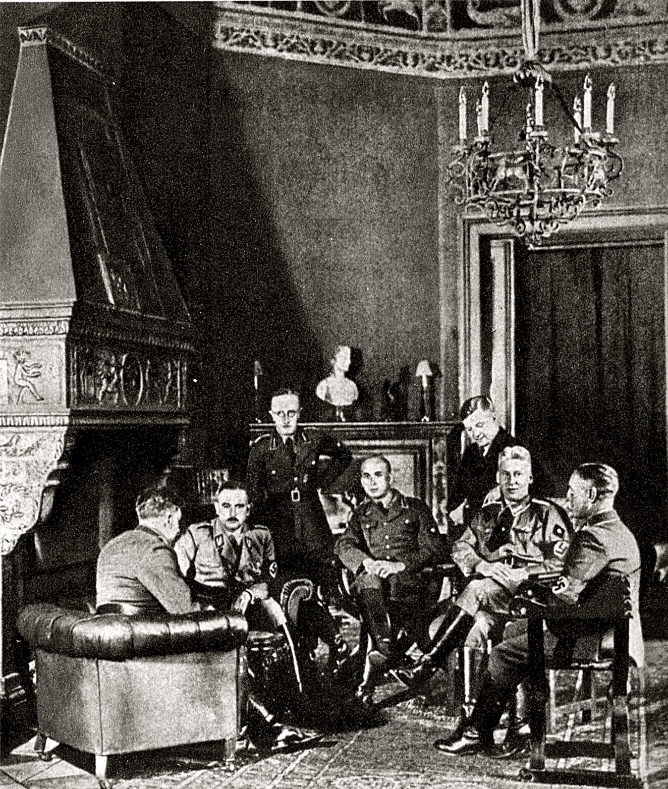 Высшая администрация науки Третьего Райха